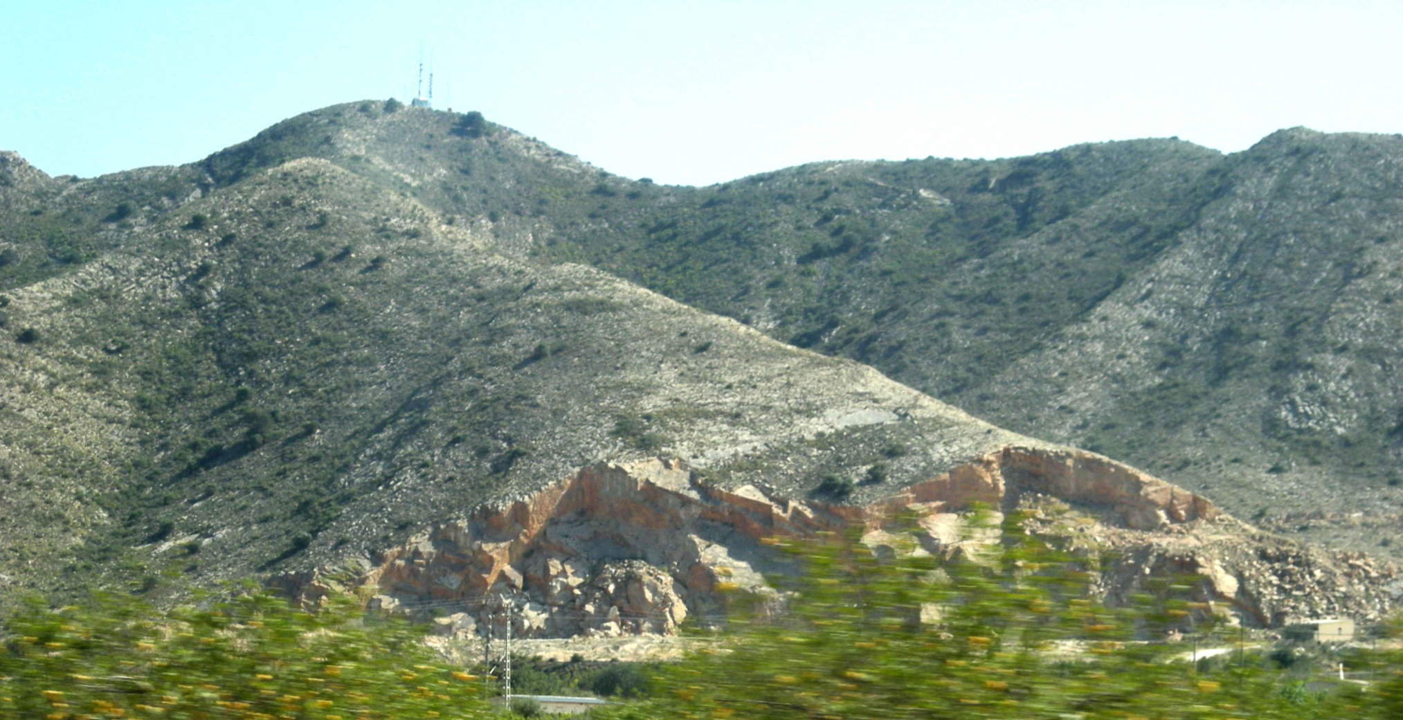 Cabezo Gordo - Torre Pacheco - Región de Murcia